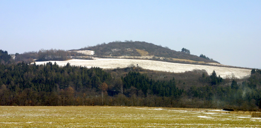 Vrchol Chlumu v pohledu ze silnice mezi Nadrybami a Kostelcem.)